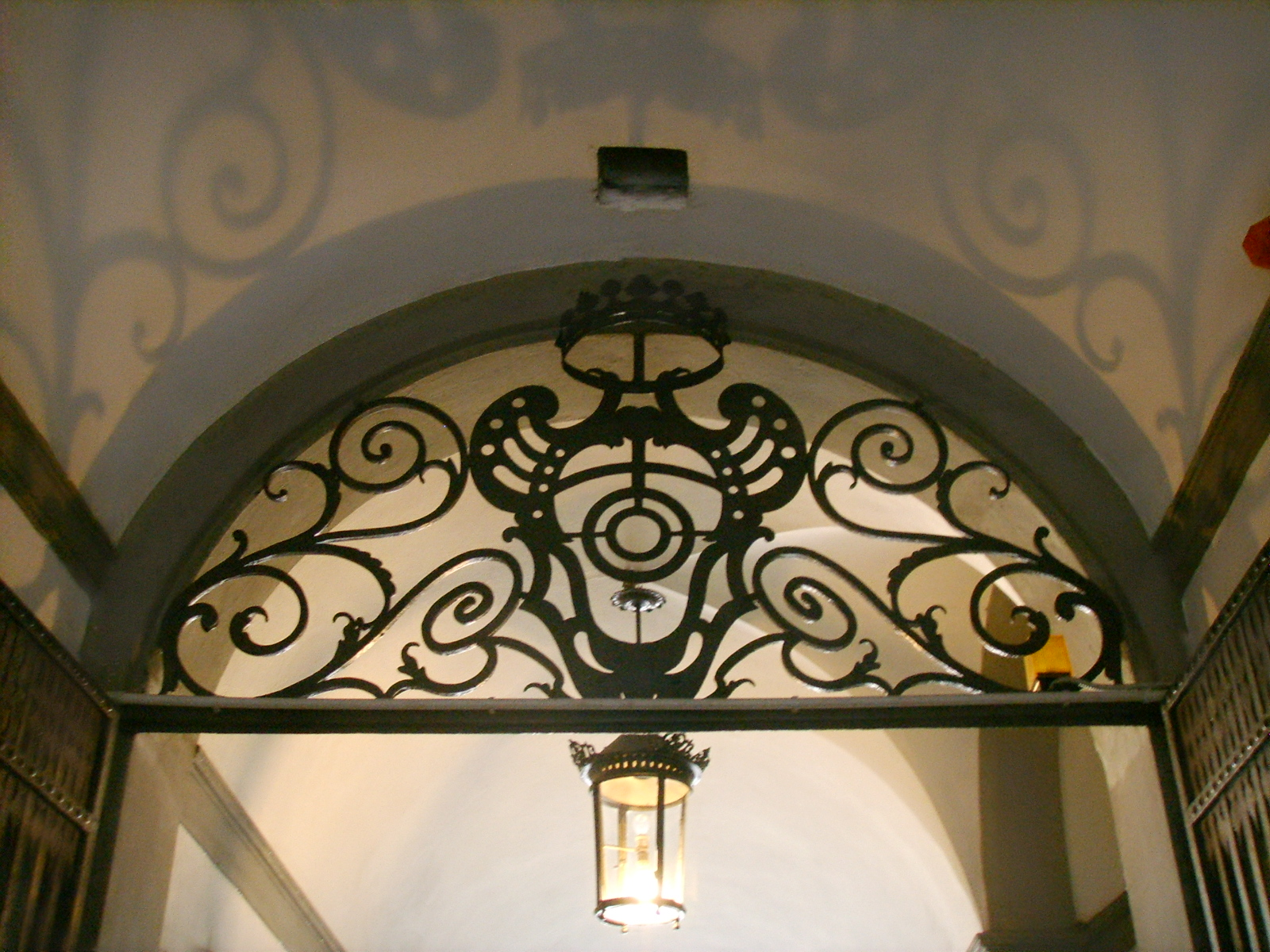 Palazzo albizi stemma sulla cancellata